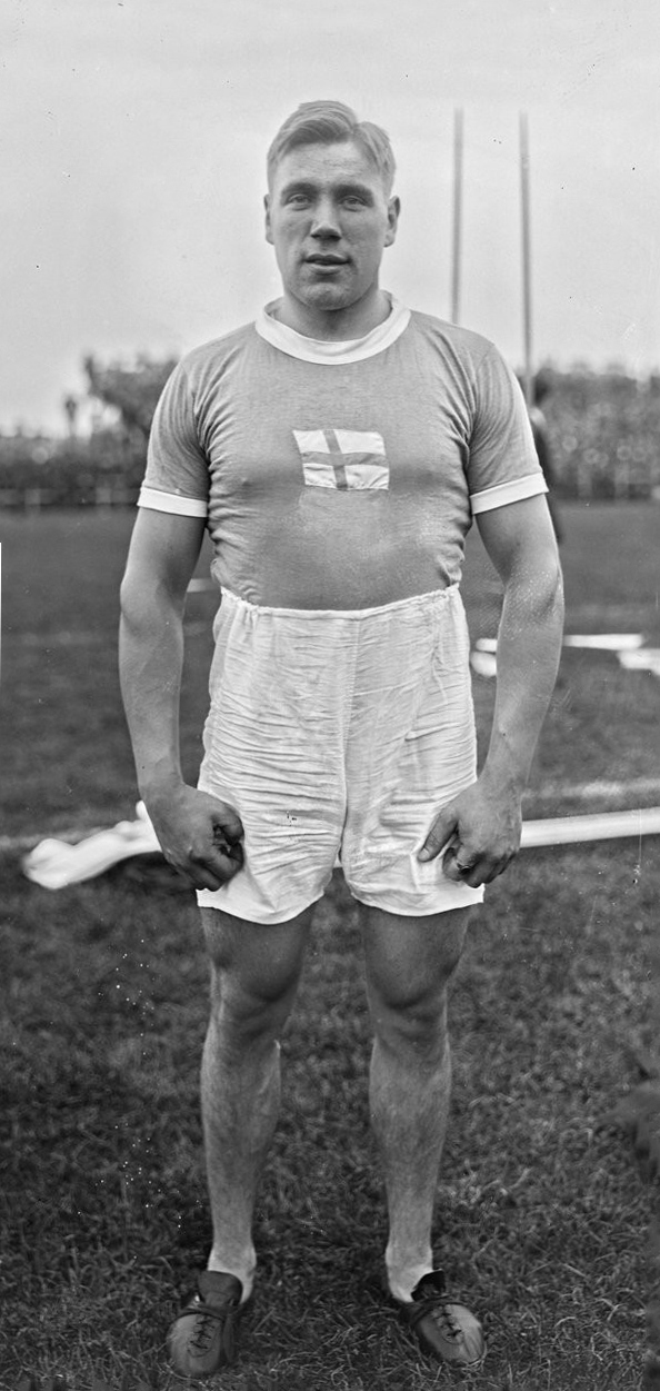 Nittinaa [i.e. Vilho Niitymaa, stade Bergeyre, match France-Finlande d'athlétisme, le 23 septembre 1922] : [photographie de presse] / [Agence Rol]